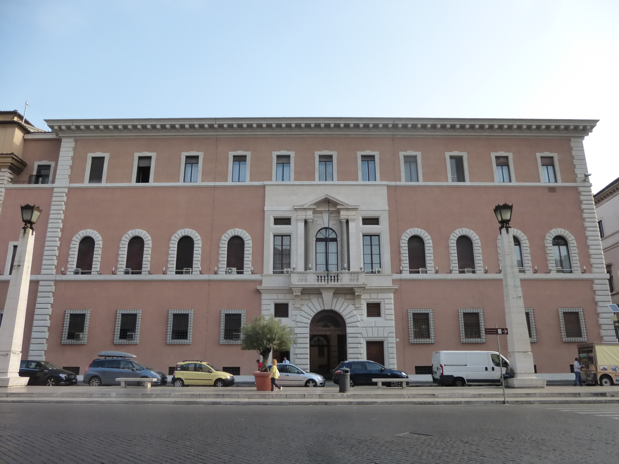 Roma, via della Conciliazione. Palazzo dei Convertendi ricostruito e ridipinto.